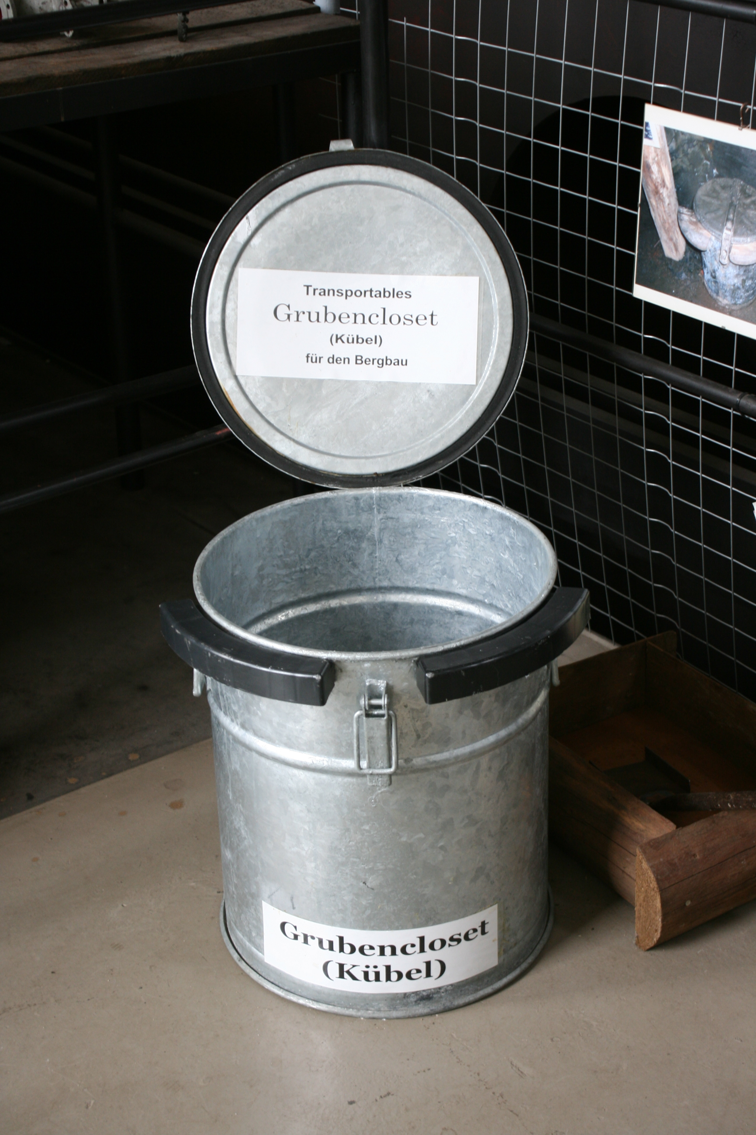 Museum: Südliches Maschinenhaus von Zeche Consolidation Schacht 9 in Gelsenkirchen